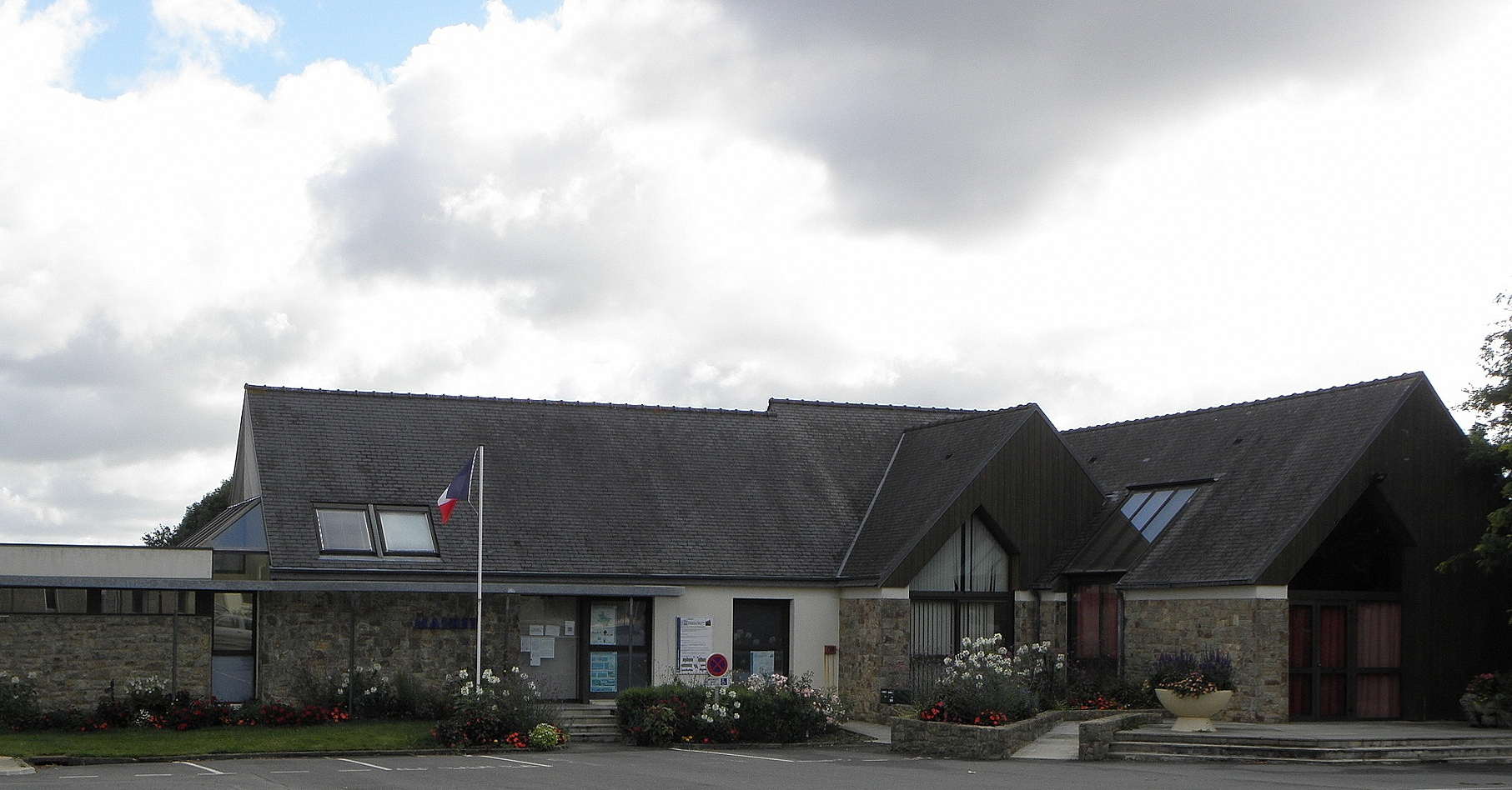 Mairie de Grâces (22).